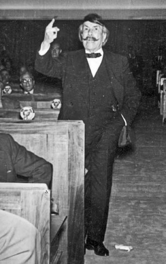 Es una foto del legislador Alfredo Palacios en la Asamblea Constituyente del año 1957 realizada en Santa Fe.